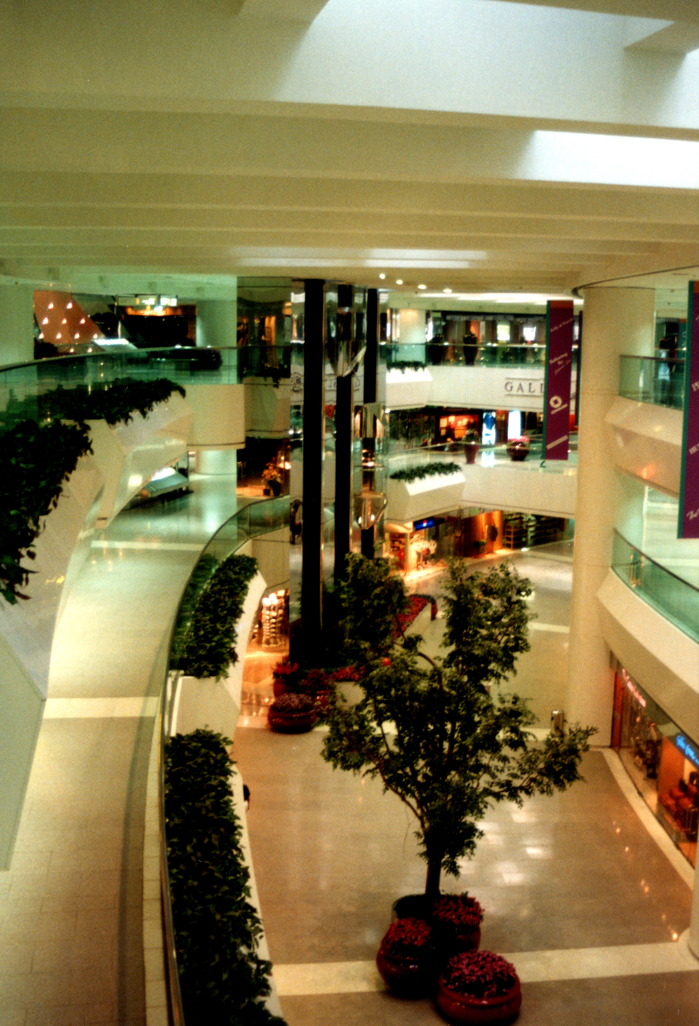 Pacific Place 太古廣場